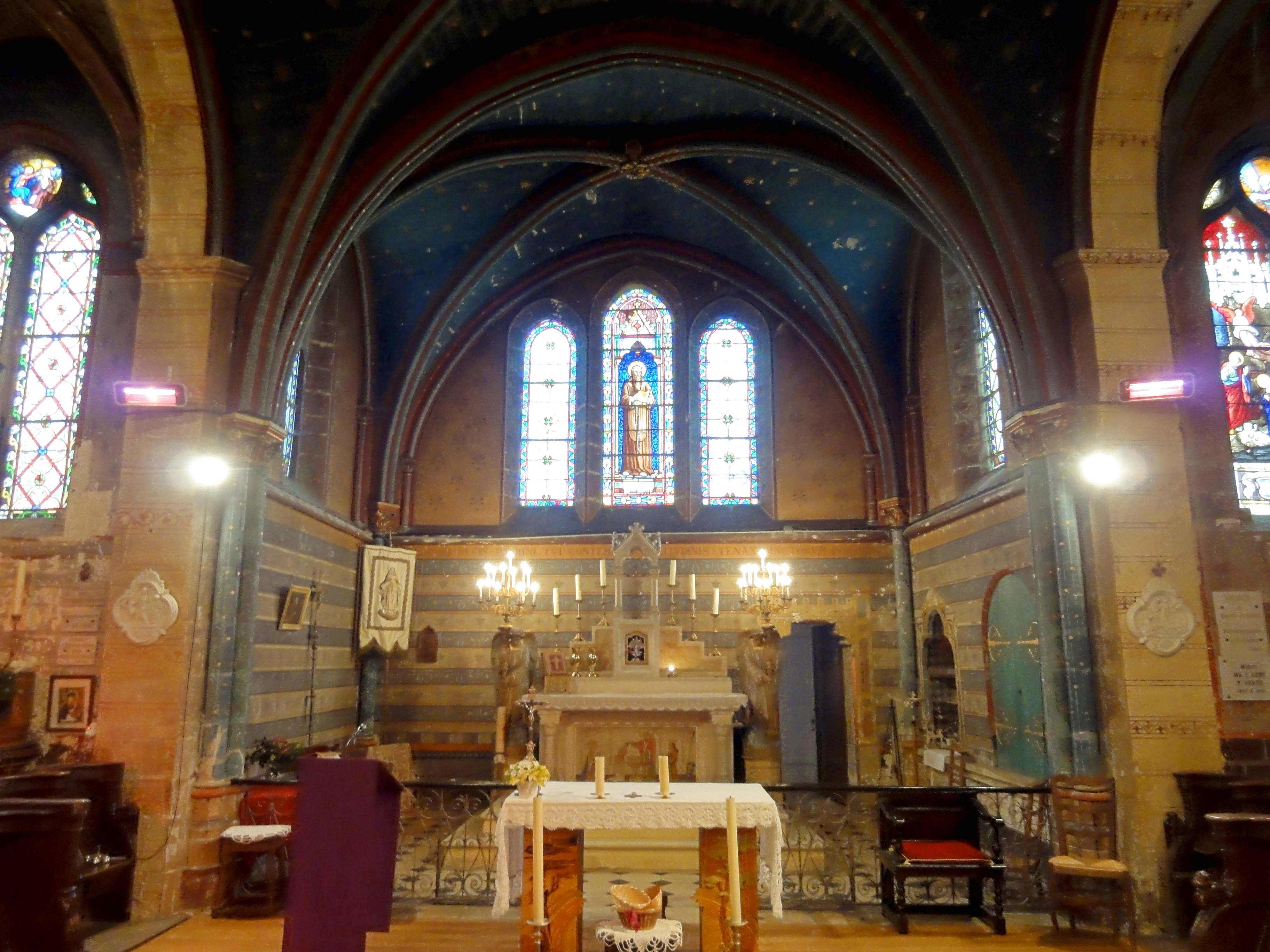 Intérieur de l'église (voir titre du fichier).